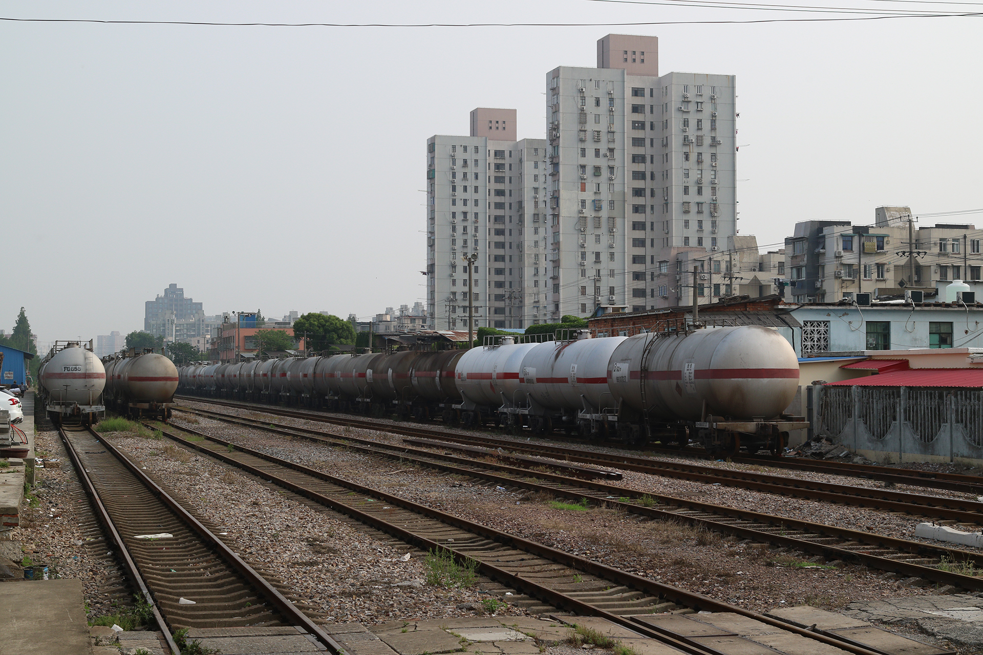 何杨支线铁路殷行站